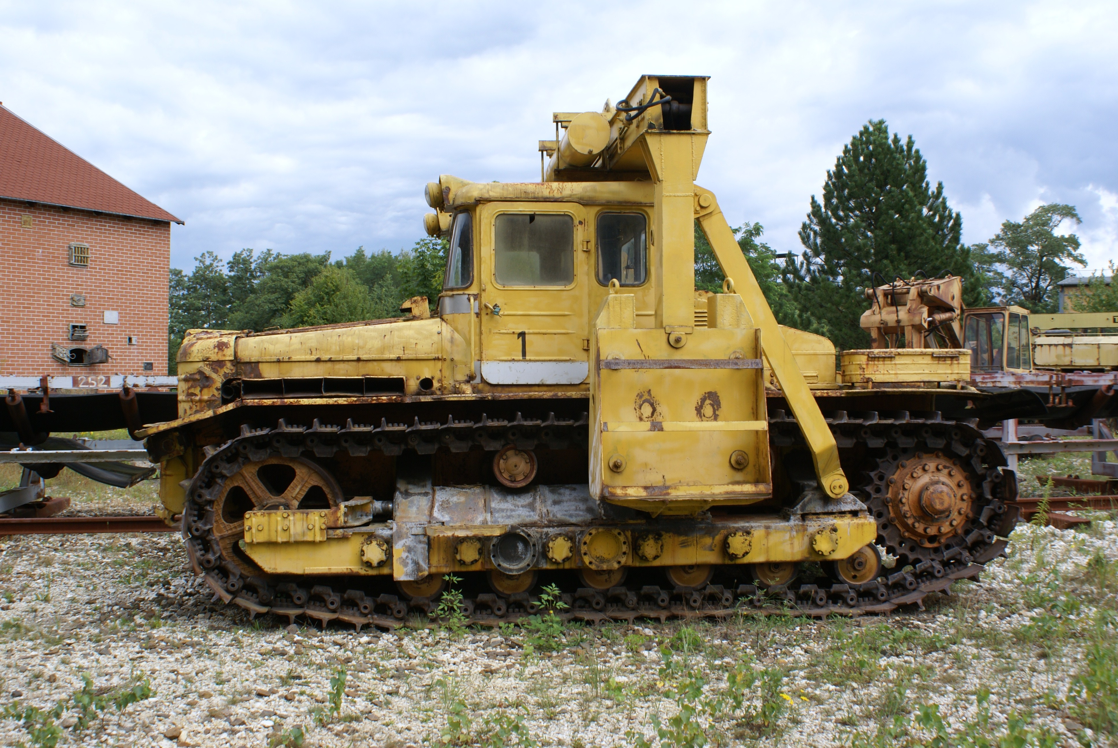 Energiefabrik Knappenrode in Hoyerswerda-Knappenrode